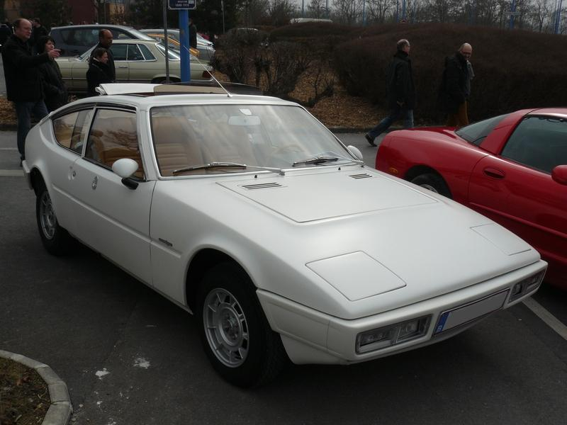 Reims 2012